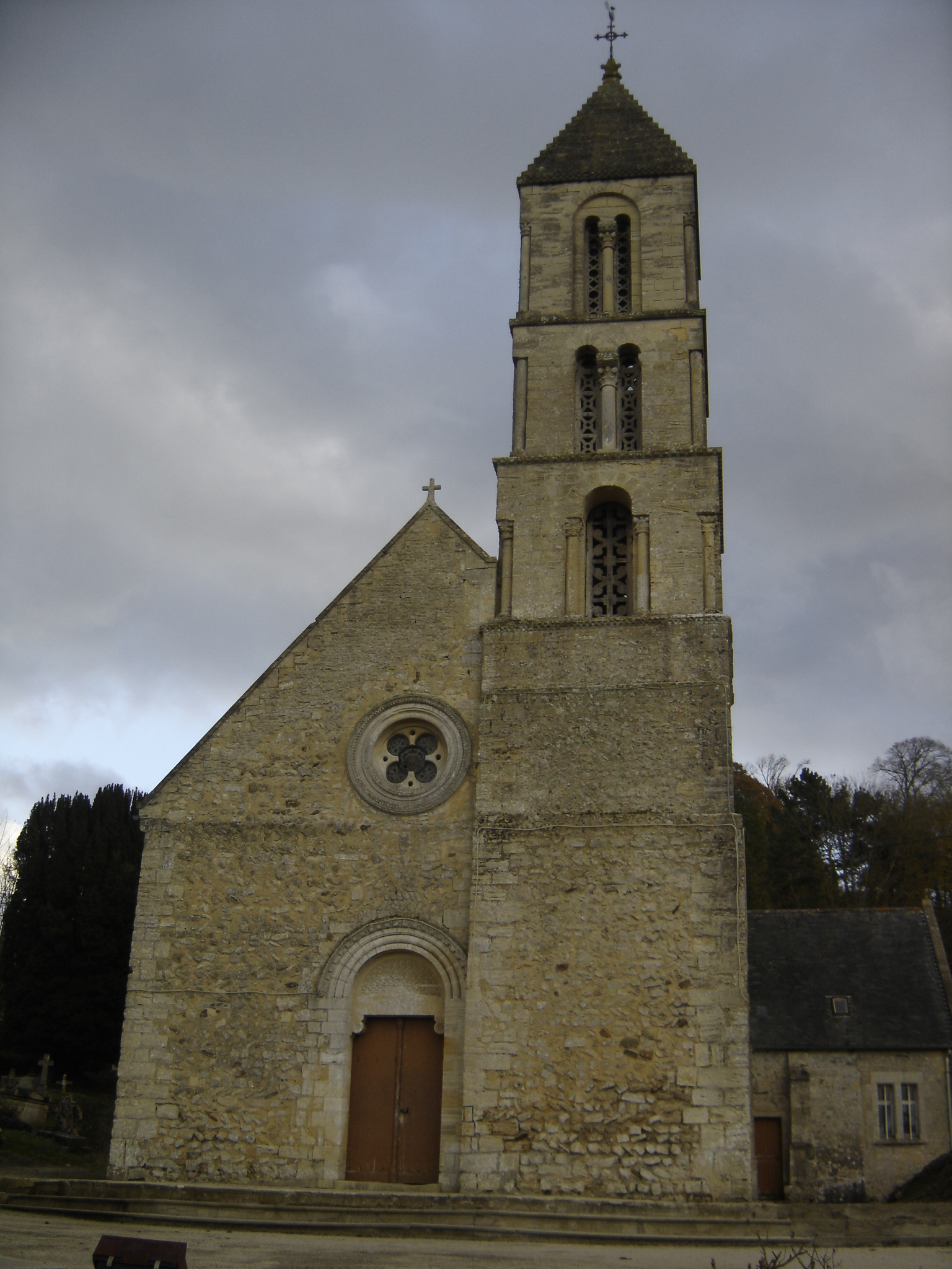 façade nord-ouest et clocher de l'église Notre-Dame